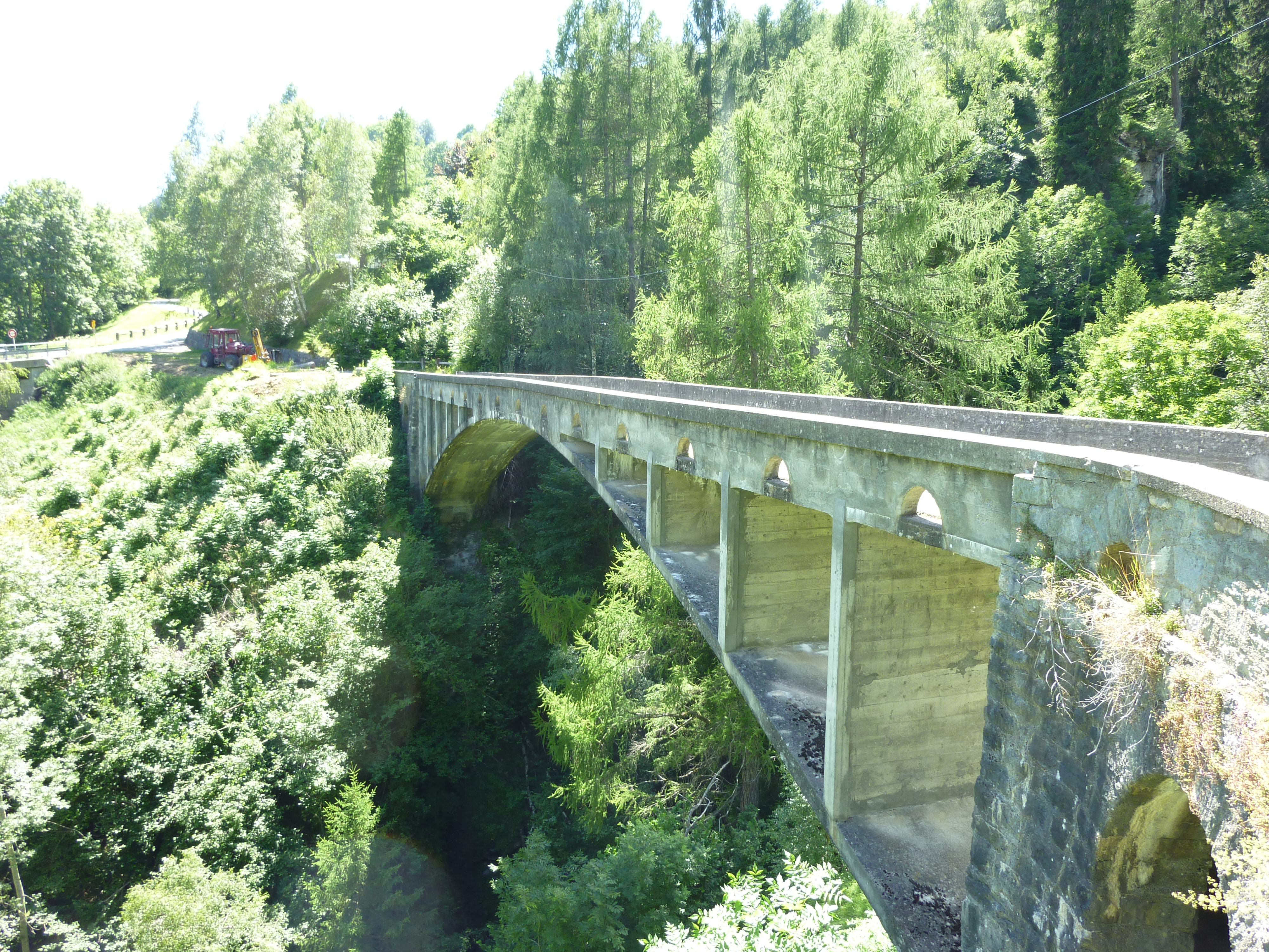 Valtschielbrücke